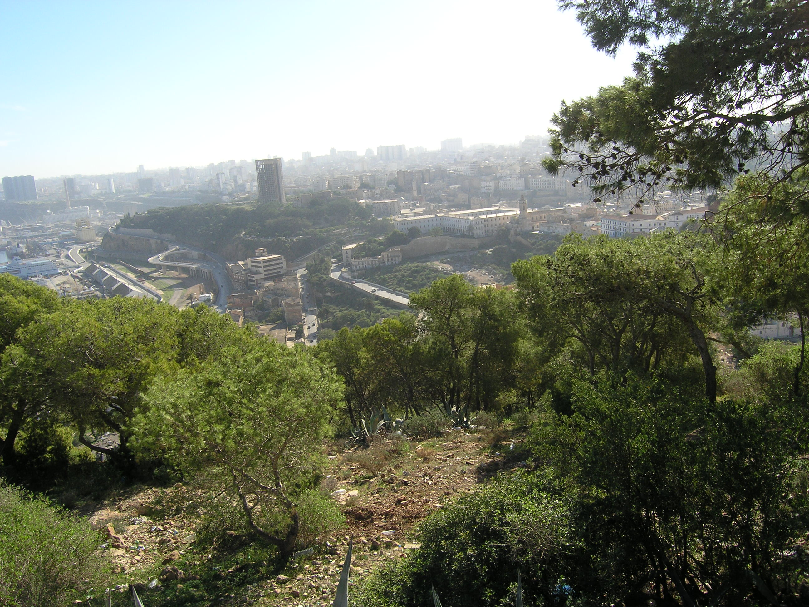 Vue depuis le Fort Santiago, Oran (Algérie).